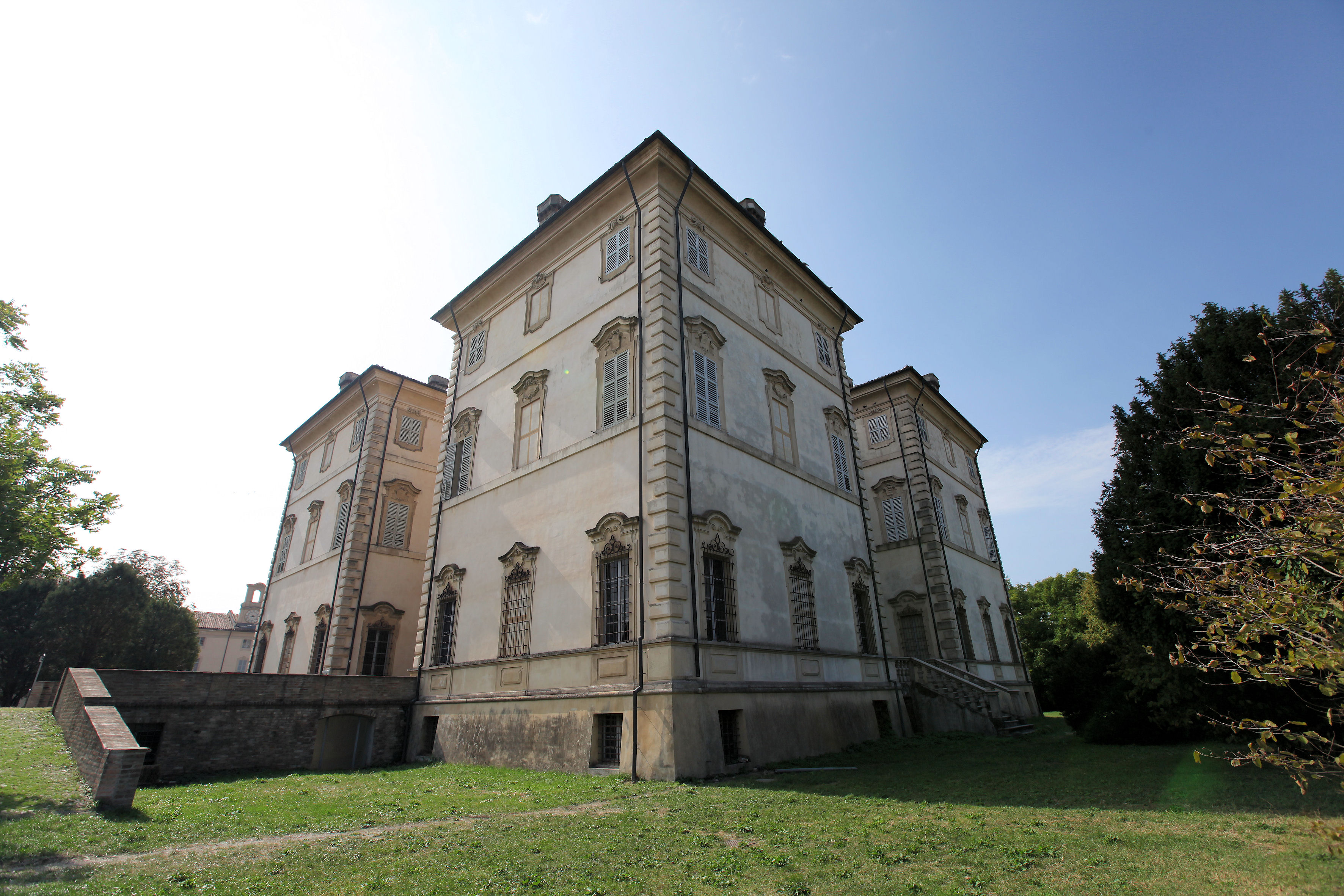 Villa Pallavicino di Busseto This is a photo of a monument which is part of cultural heritage of Italy.